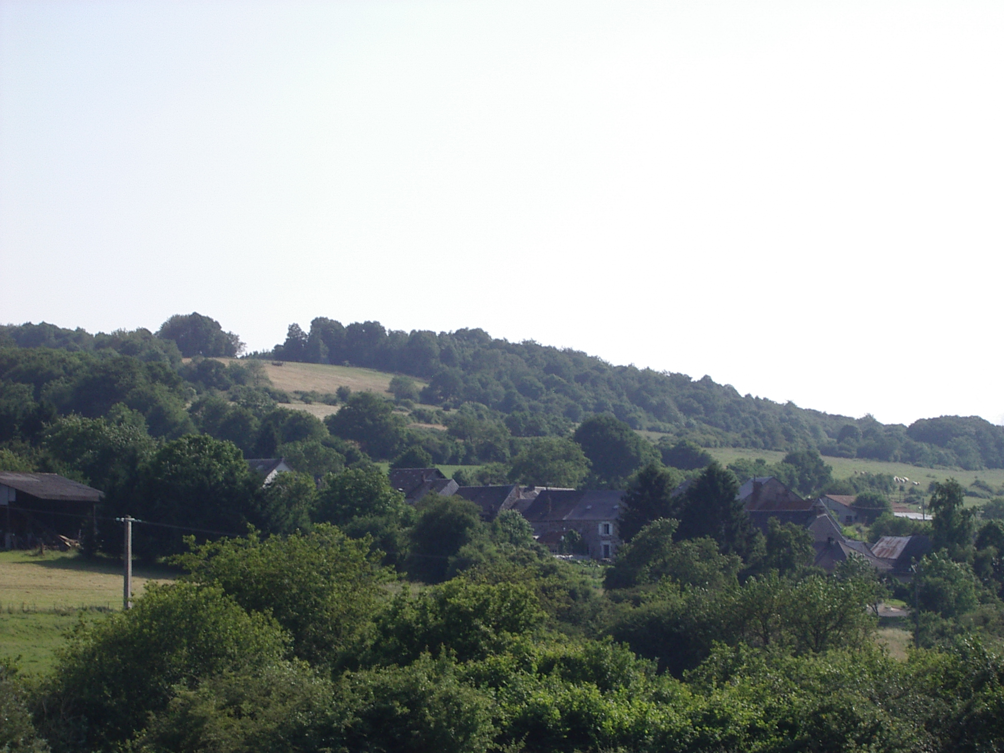 Panorama de Charnois, commune française, située dans le département des Ardennes et la région Champagne-Ardenne